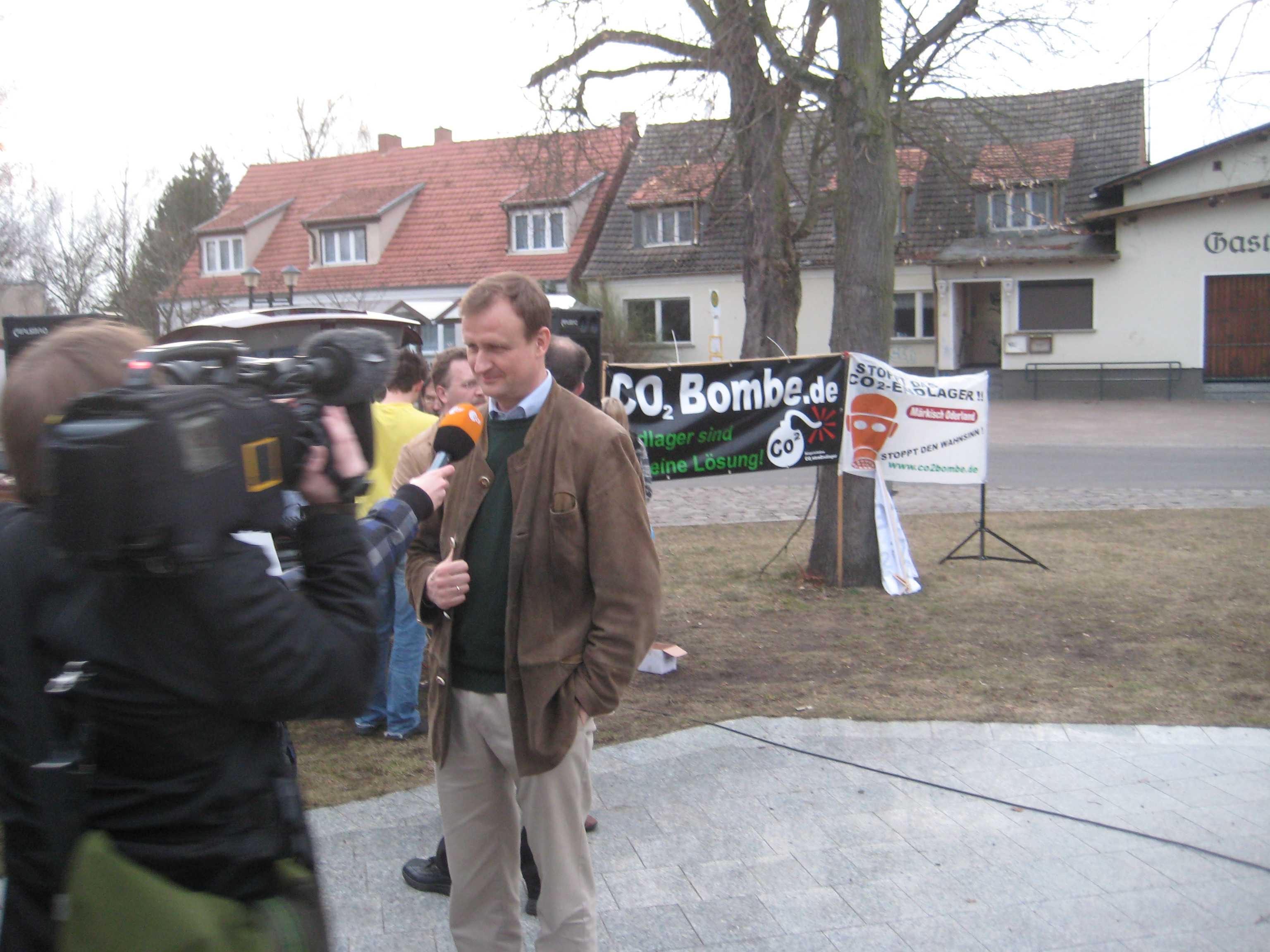 Hans-Georg von der Marwitz (CDU) auf einer Demonstration in Neutrebbin gegen CCS